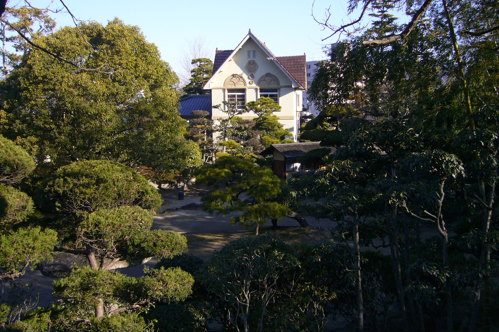 Fukuju-kaikan in Fukuyama, Hiroshima, Japan